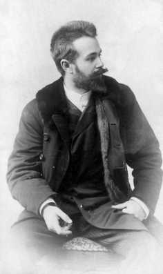 Zala György (1858–1937) szobrászművész. Strelisky Sándor felvétele